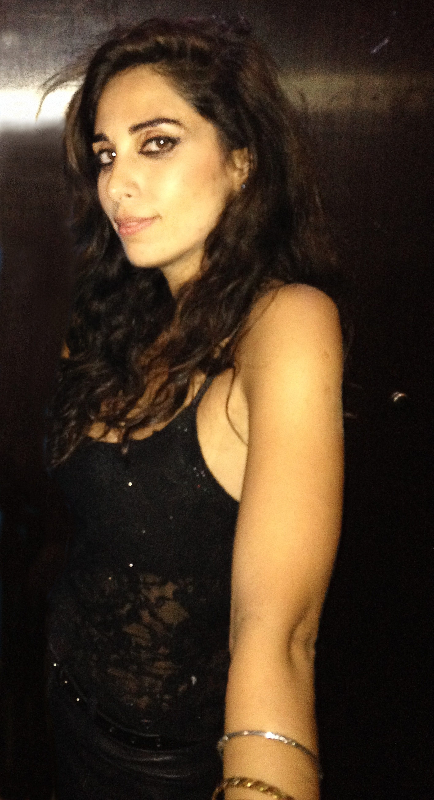 Yasmine Hamdan in Berlin, Privatclub